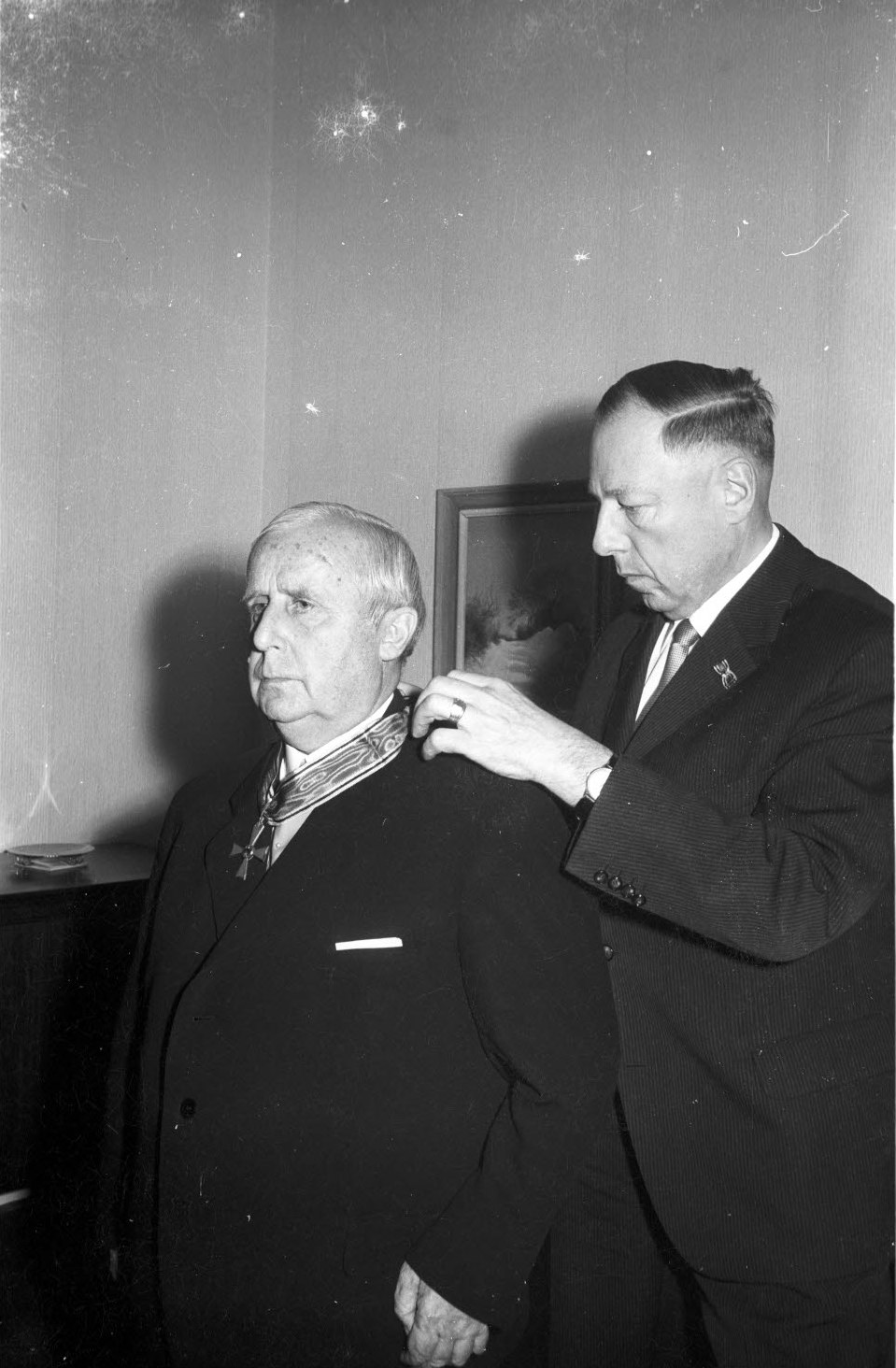 Ministerpräsident Helmut Lemke (rechts) überreicht Wilhelm Rohwedder (links) aus Beusloe die Auszeichnung für seine Verdienste in der Kommunal- und Landespolitik im Kreis Oldenburg.